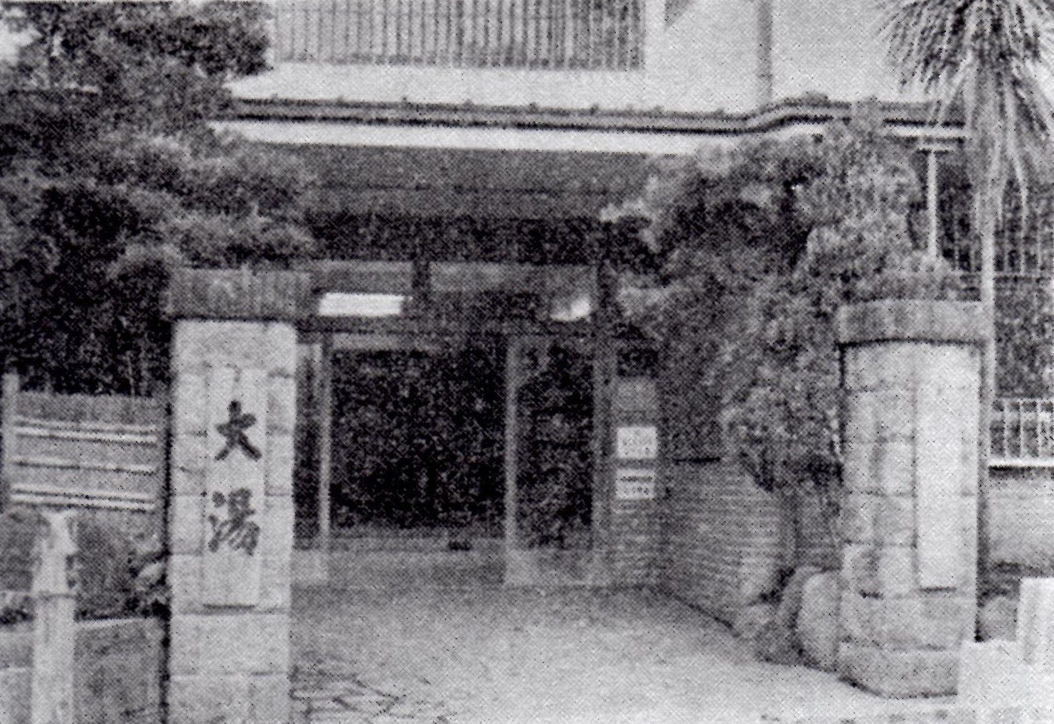 熱海の大湯旅館の門と玄関。左側の「大湯」の看板は松方公爵、右側のキュウ汽館の看板は岩倉公爵。